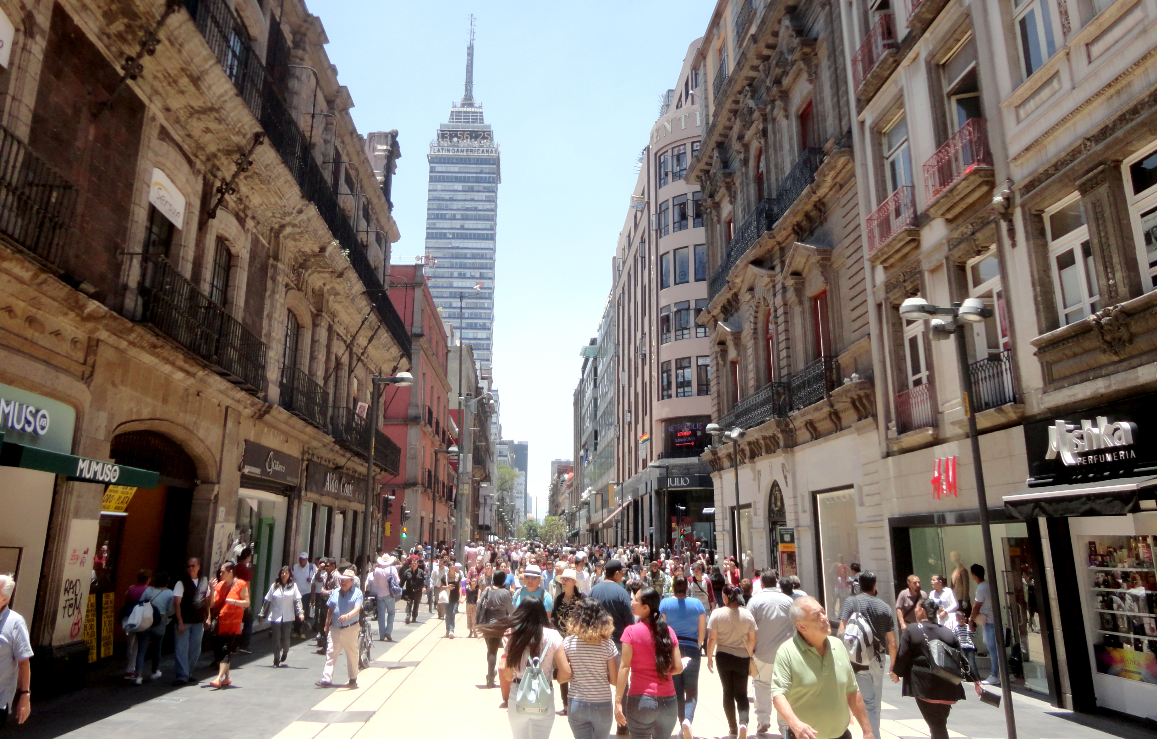 Avenida Francisco I. Madero, Centro Histórico, Ciudad de México